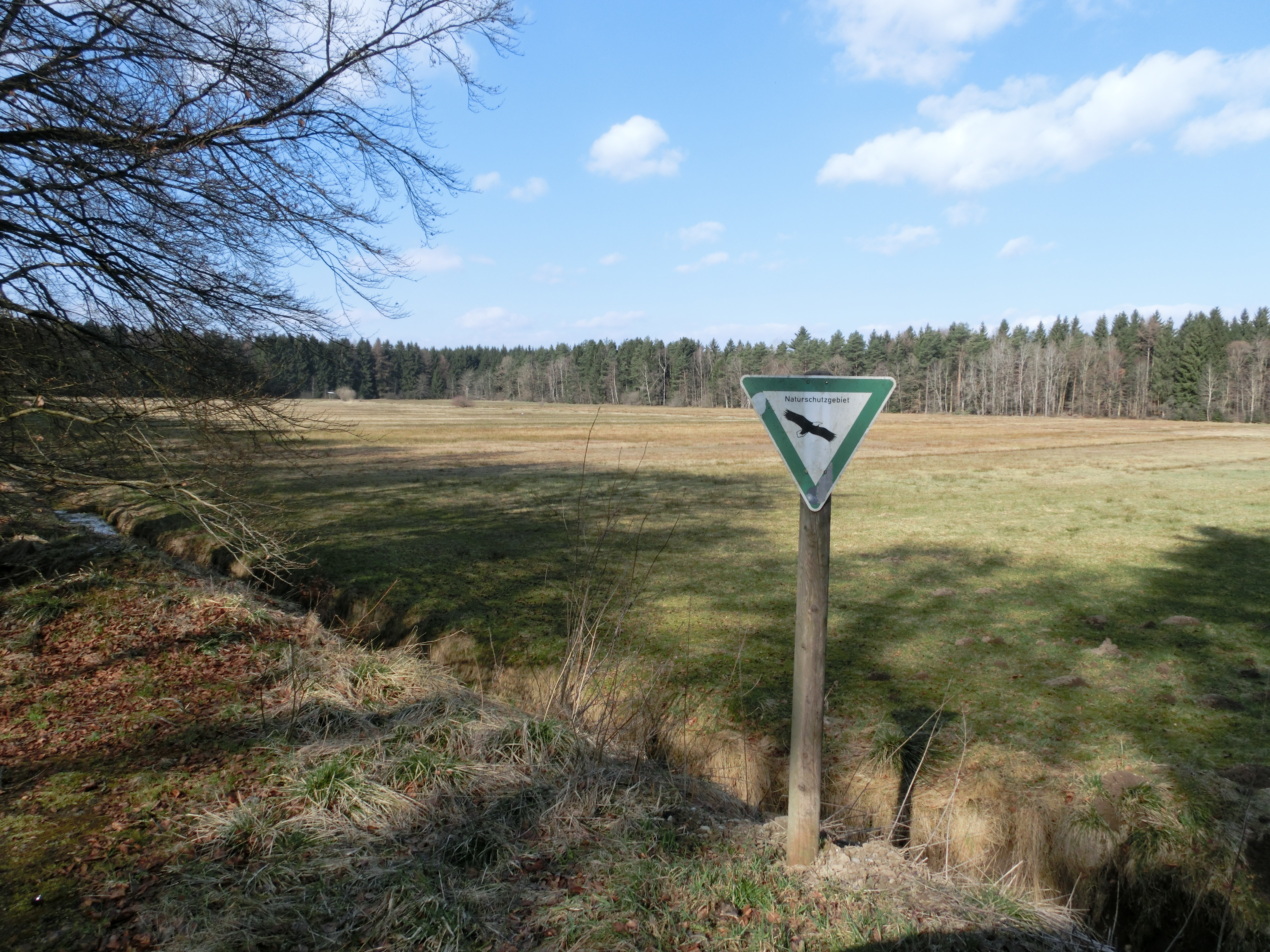 Deutschland - Baden-Württemberg - Landkreis Sigmaringen - Ostrach: Naturschutzgebiet "Schwarzes Moos"